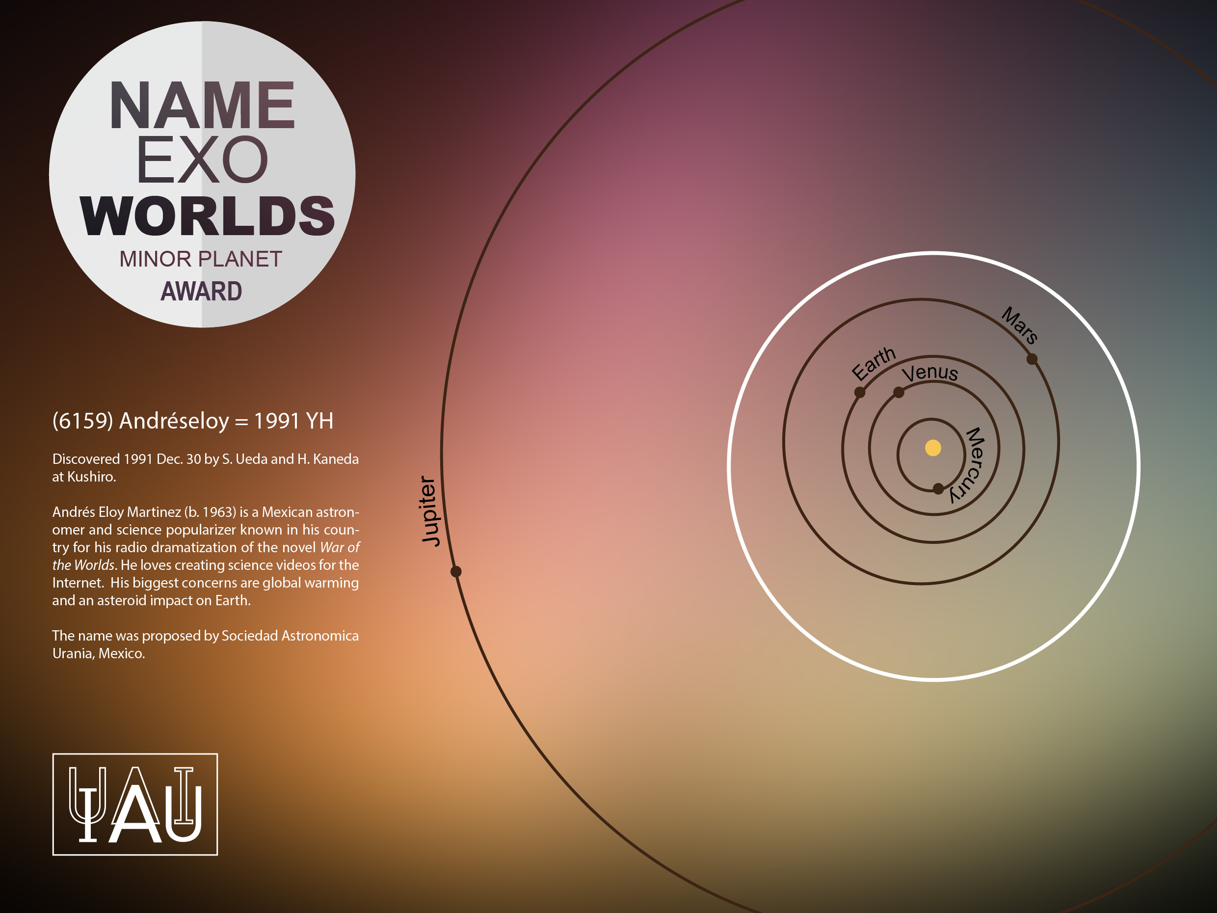 Diagrama de la orbita del asteroide (6159) Andréseloy en el sistema solar, nombrado asi en honor al astronomo Andres Eloy Martinez Rojas por la Union Astronomica Internacional.